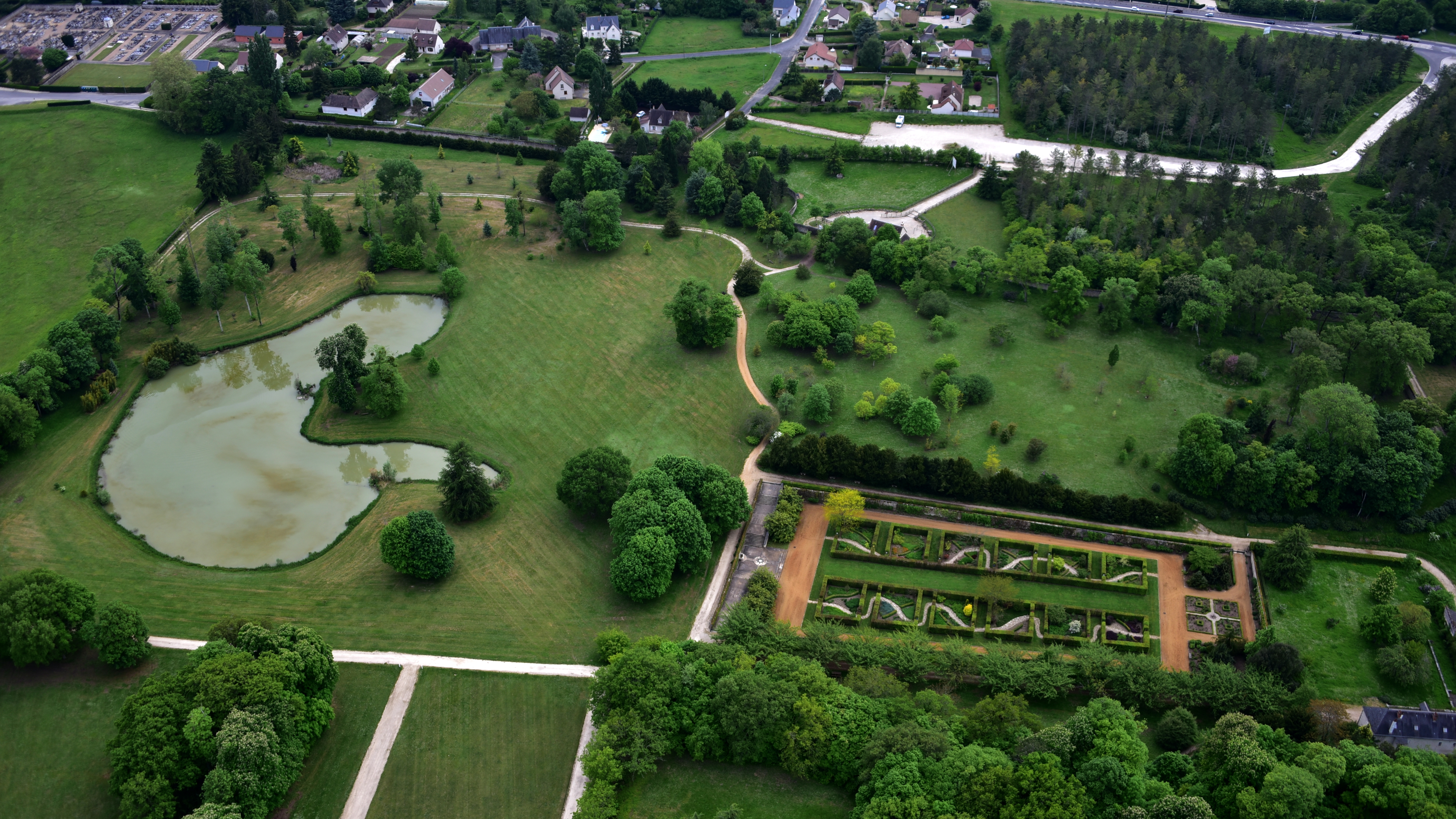 Schloss Beauregard, Park, Luftaufnahme (2016)